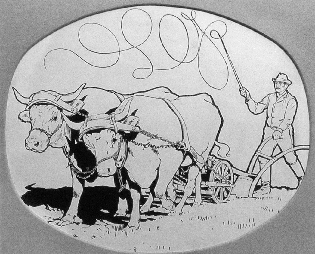 Max Eyth, Pflügender Bauer, Entwurf für das Signet der Deutschen Landwirtschafts-Gesellschaft, 1887. – Ochsengespann, bei dem die Peitsche des Ochsenführers die Buchstaben DLG (Deutsche Landwirtschafts-Gesellschaft) bildet. Das Signet wurde von der DLG bis 1963 verwendet.